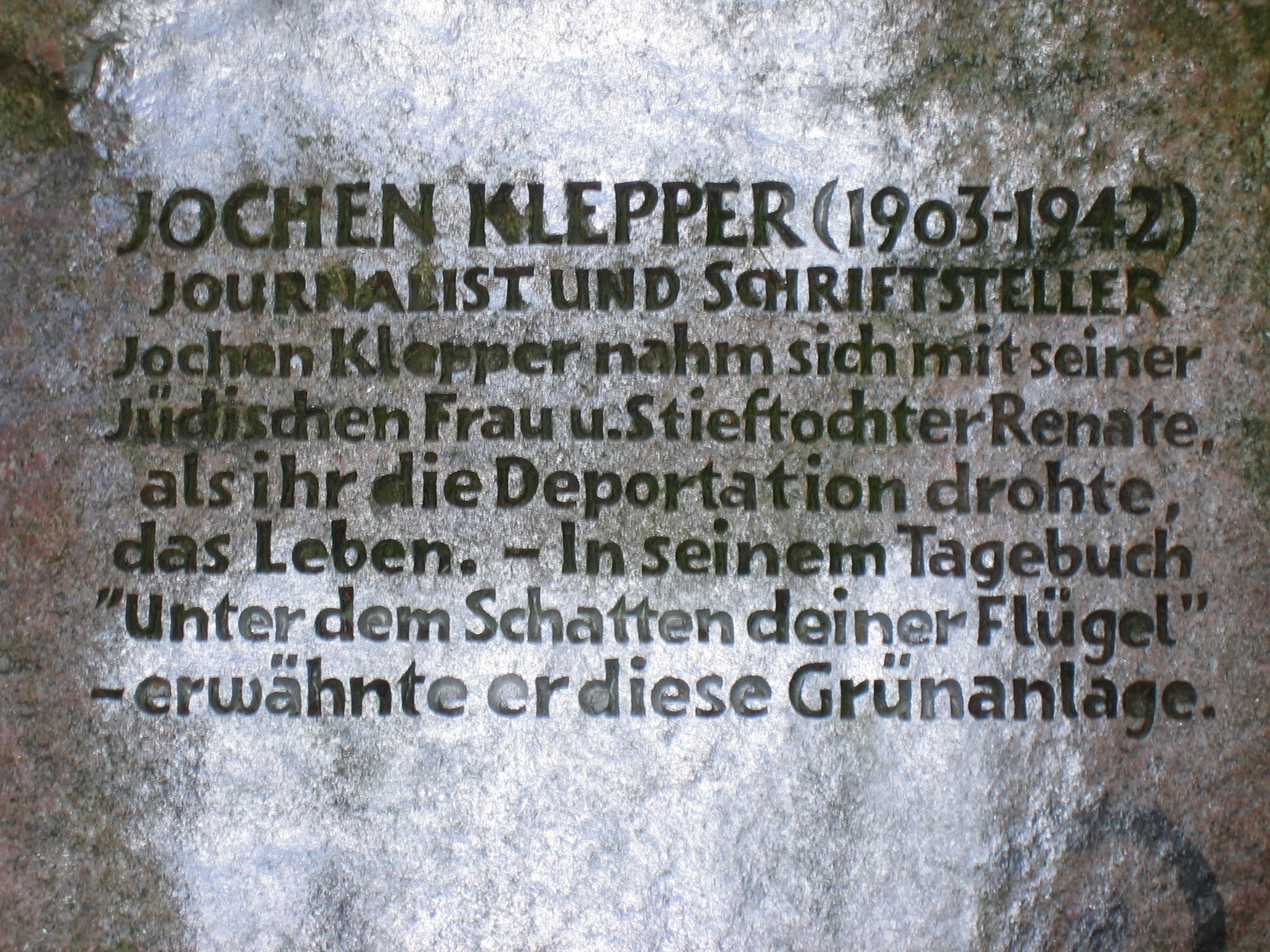 Gedenkstein im Jochen-Klepper-Park in Höhe der Gurlittstraße an der Sembritzkystraße in Berlin-Südende